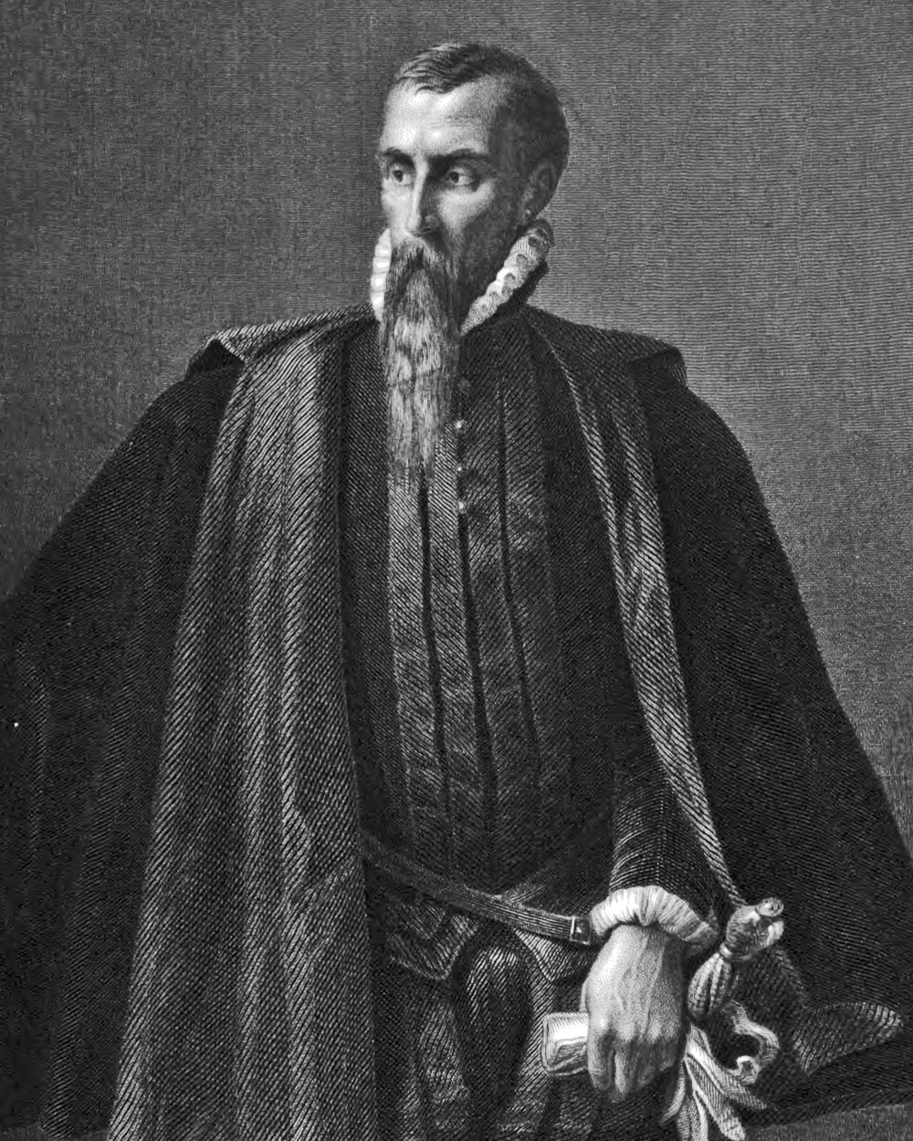 Alba aus Friedrich Schillers Drama Don Carlos